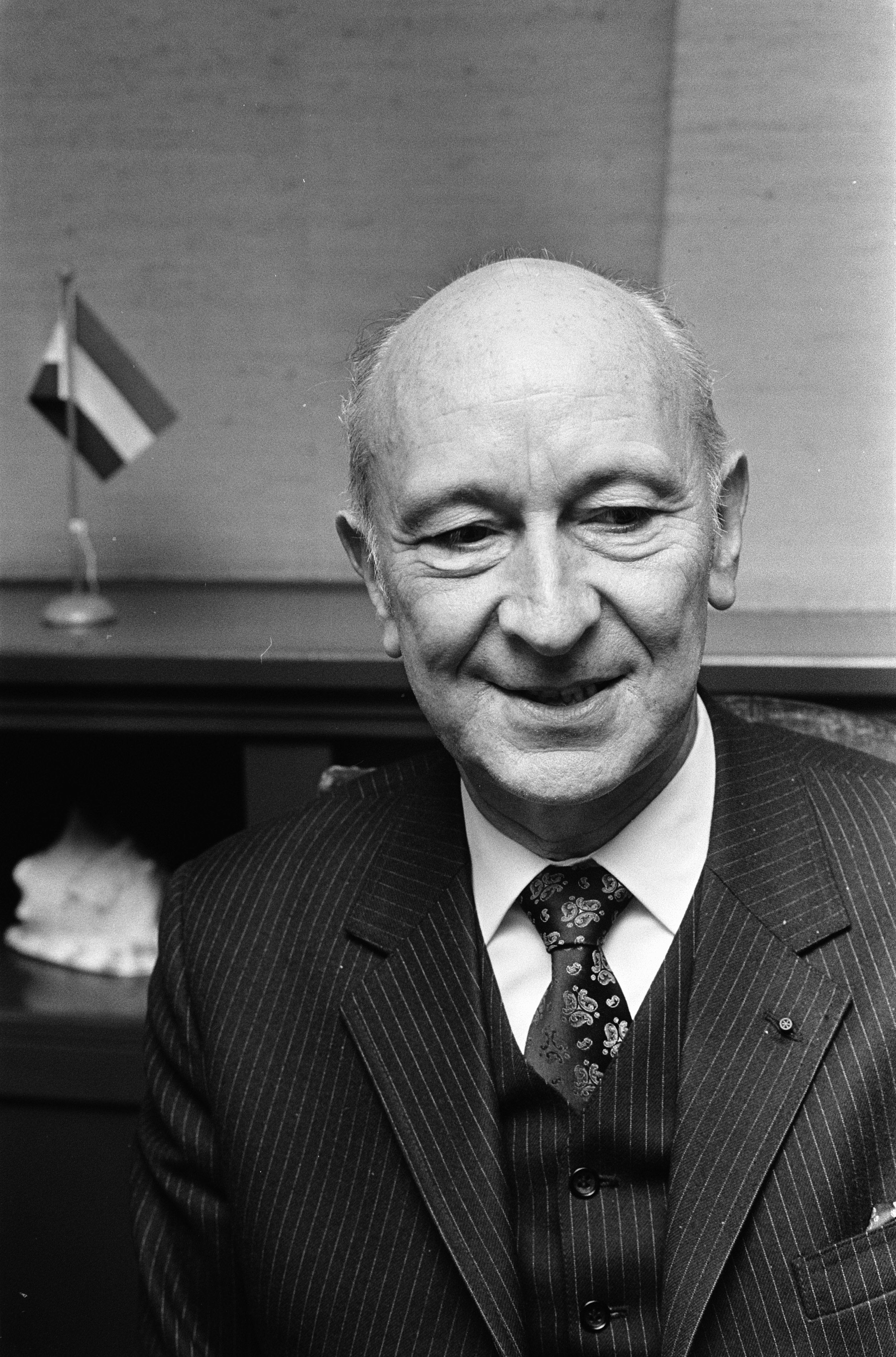 Collectie / Archief : Fotocollectie Anefo Reportage / Serie : [ onbekend ] Beschrijving : Persconferentie van Hof van Justitie van Eur. Gemeenschap Den Haag ; nr. 16, 17: R. Lecourt , kop, nr. 18: Mr. A. M. Donner , kop Datum : 29 september 1970 Locatie : Den Haag, Zuid-Holland Trefwoorden : persconferenties Persoonsnaam : Mr. A. M. Donner, R. Lecourt Fotograaf : Mieremet, Rob / Anefo Auteursrechthebbende : Nationaal Archief Materiaalsoort : Negatief (zwart/wit) Nummer archiefinventaris : bekijk toegang 2.24.01.05 Bestanddeelnummer : 923-8923